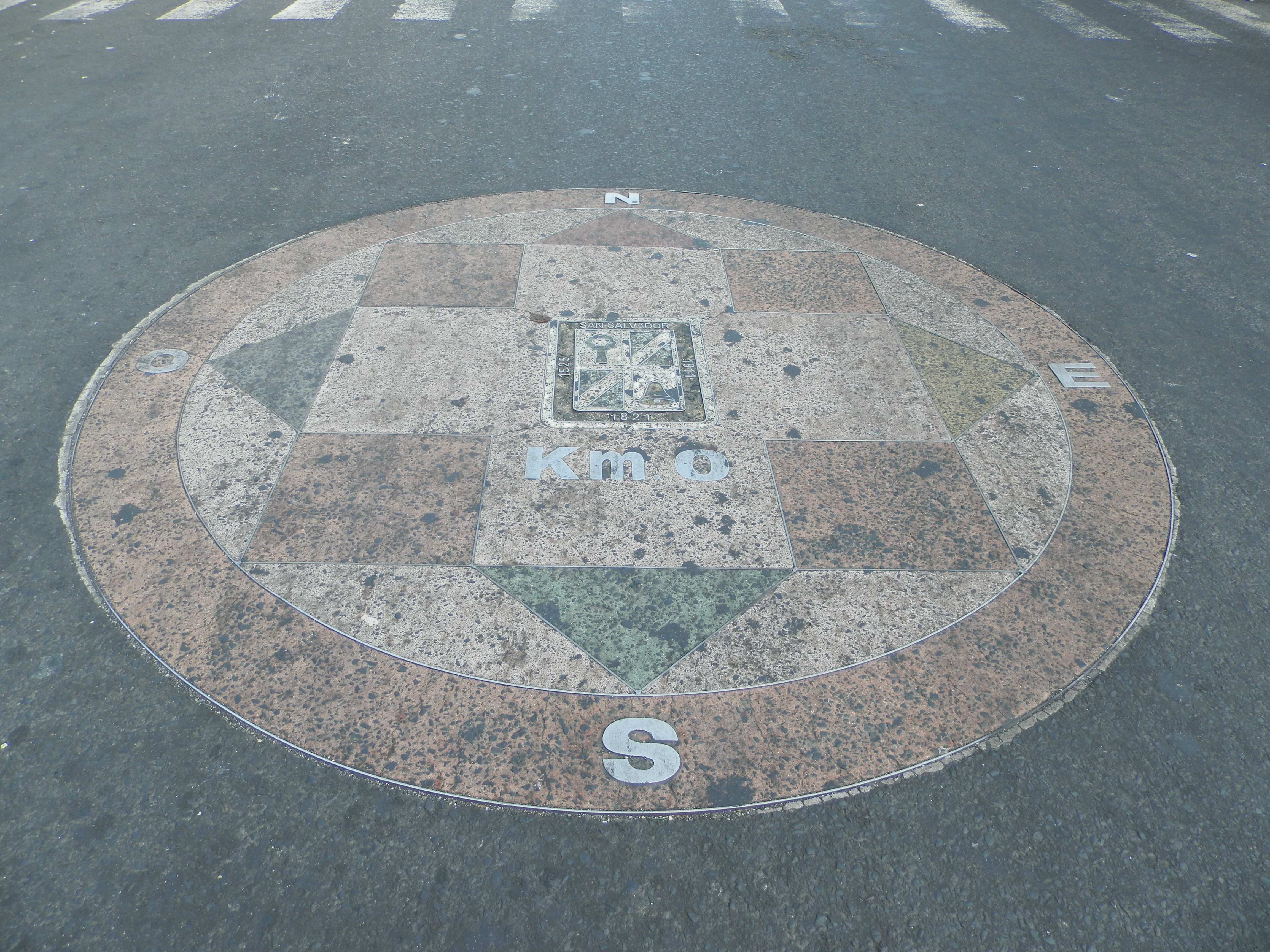 Kilometro Cero San Salvador capital de El Salvador